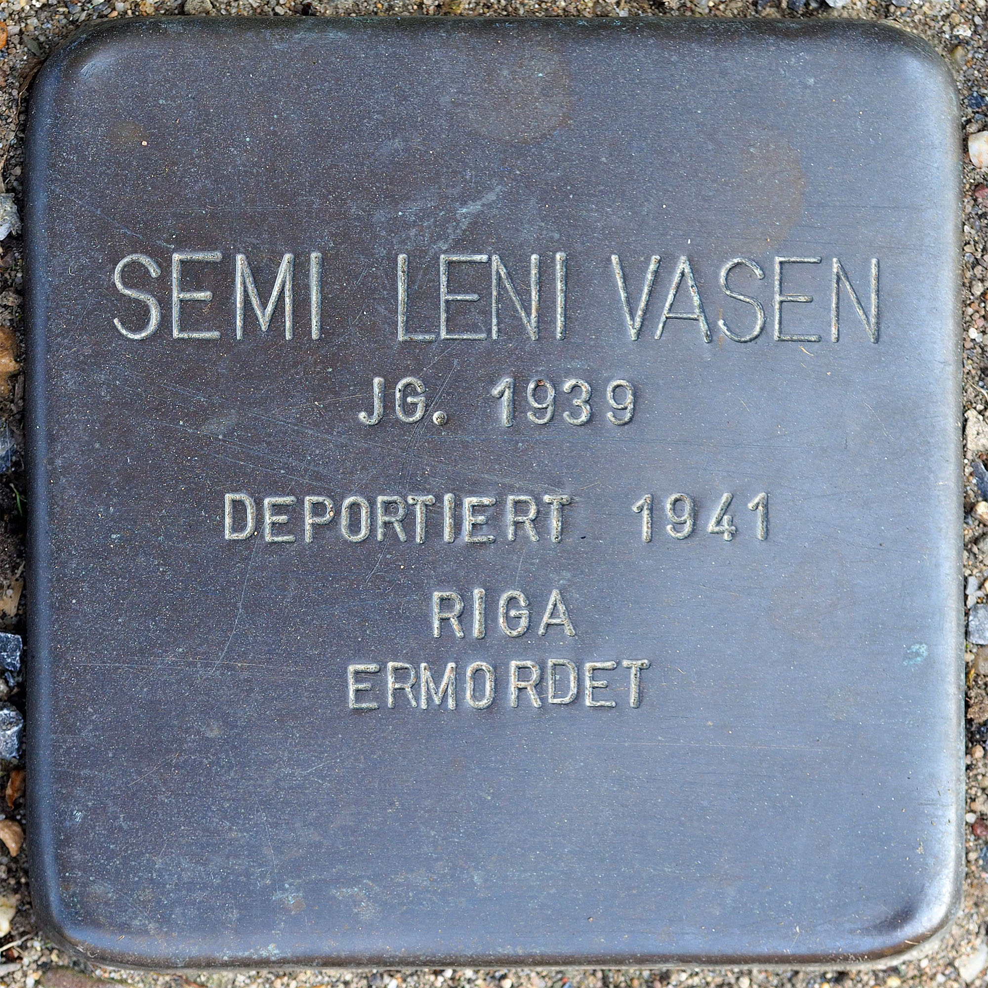 Stolpersteine GV: Vasen, Semi Leni